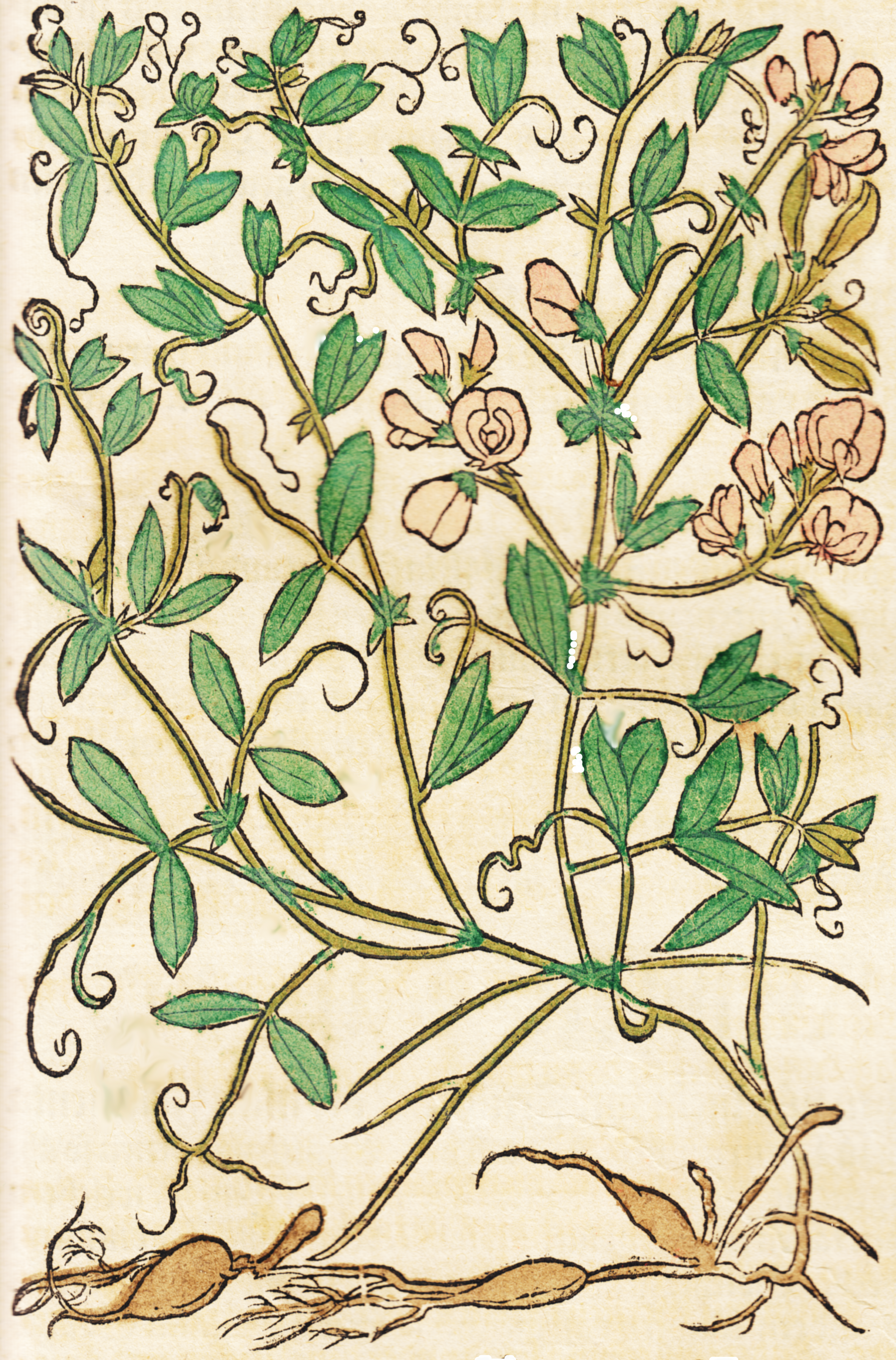 Abbildung von Lathyrus tuberosus.